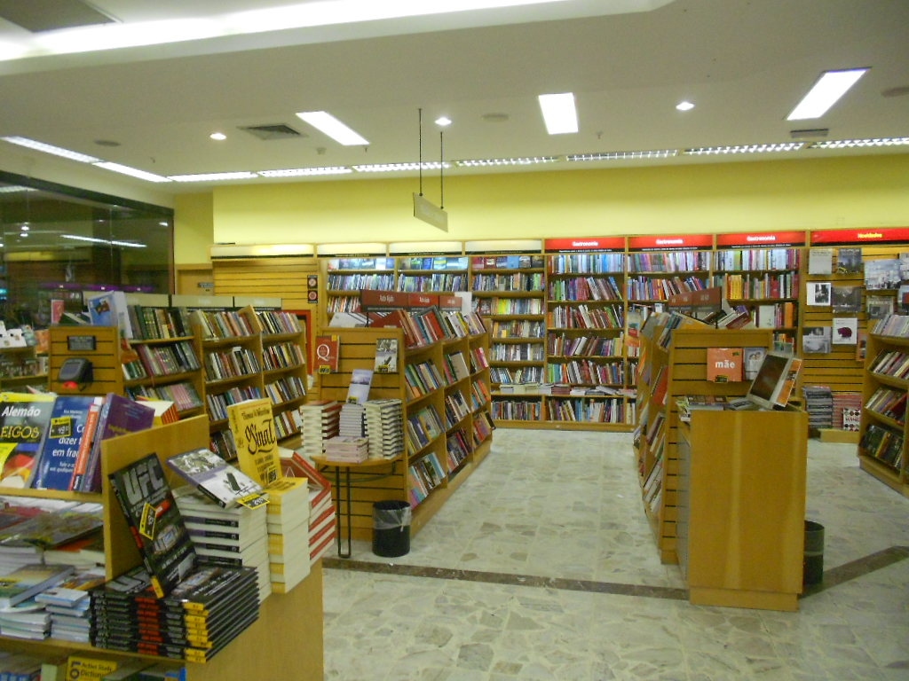 Interior da Saraiva do Rio Sul Shopping, Botafogo, Rio de Janeiro, Brasil.